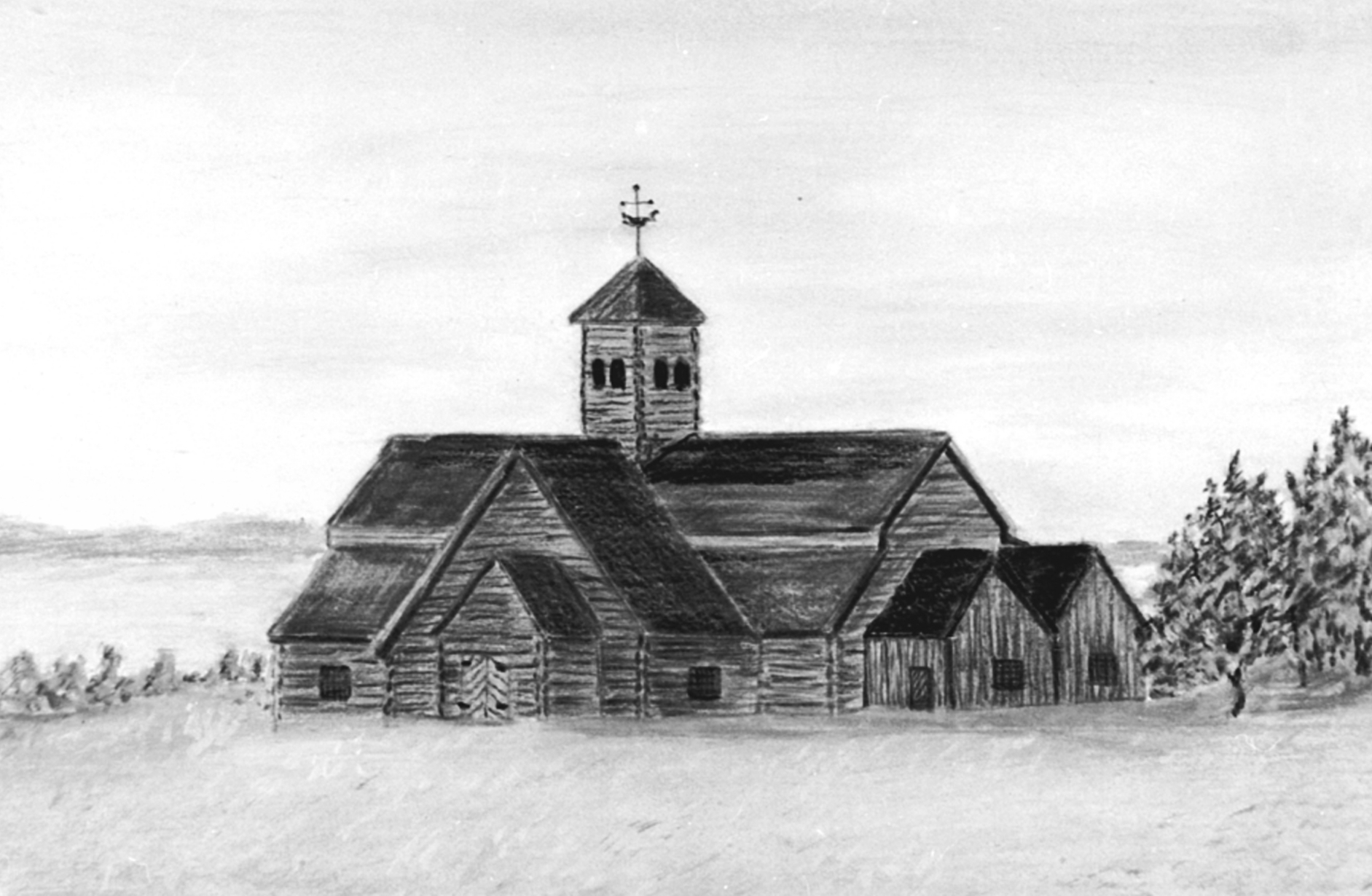 Maleri av Baldishol kirke utført av Bjørn Gjøvik etter tegning av Gerhard Evensen Mengshoel fra 1869. Fra Domkirkeoddens fotoarkiv i Digitalt museum.